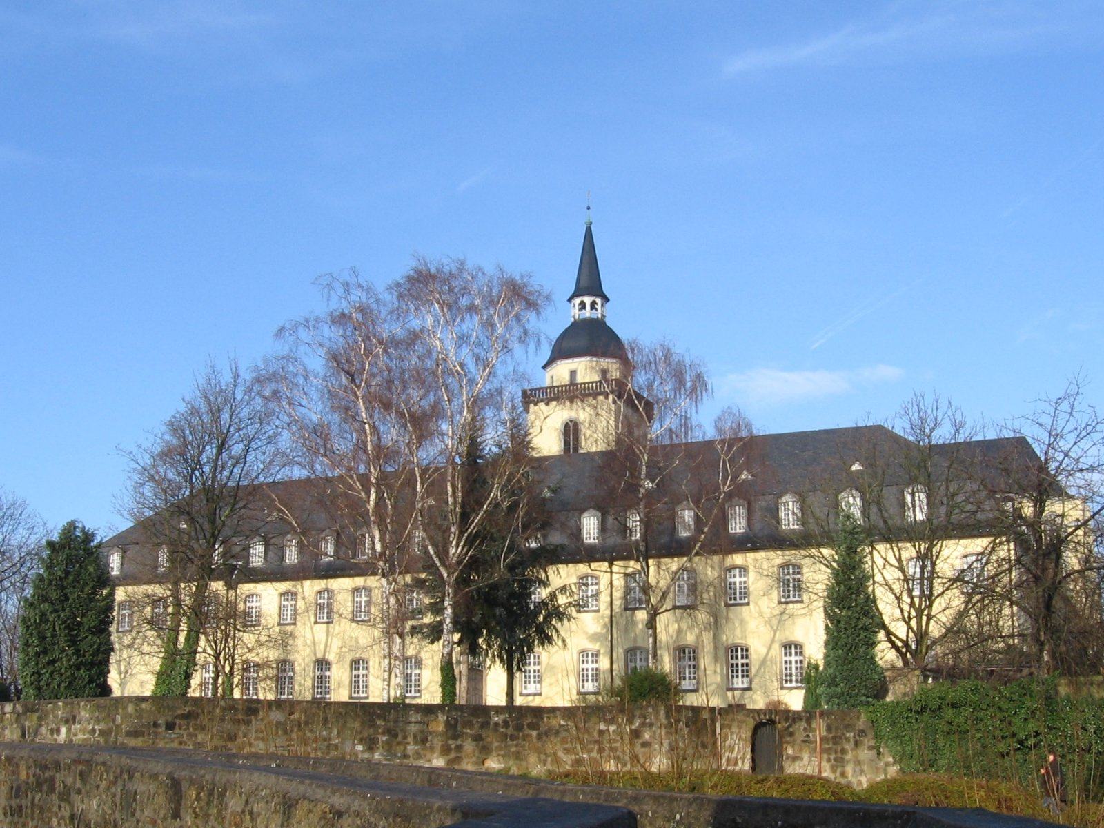 Abtei Michaelsberg, Siegburg, Germany